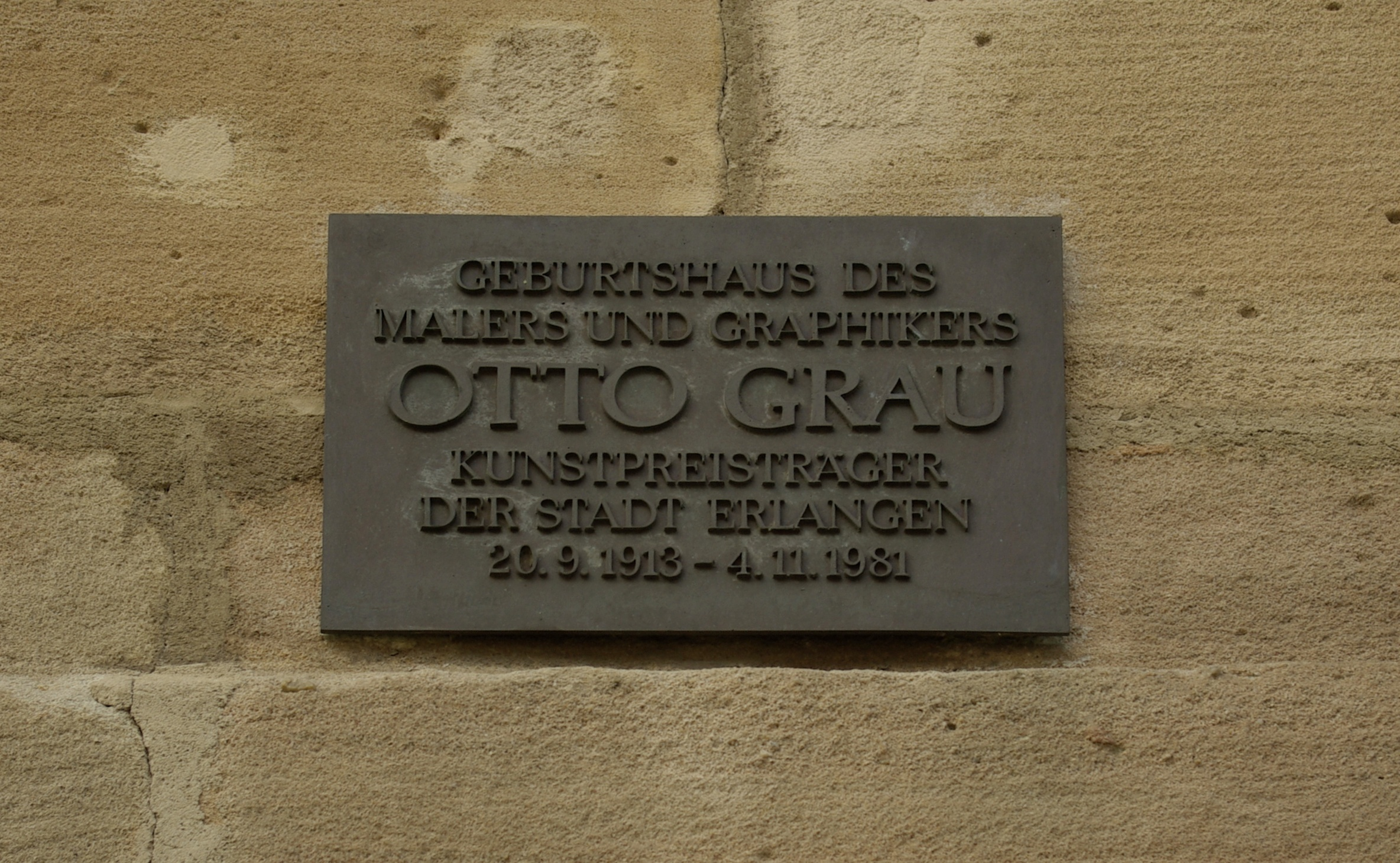 Gedenktafel für Otto Grau am Haus Obere Karlstraße 22 in Erlangen.